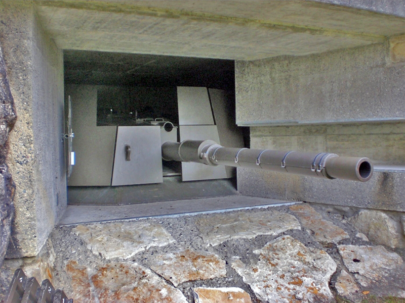 Centi Bunker Rein